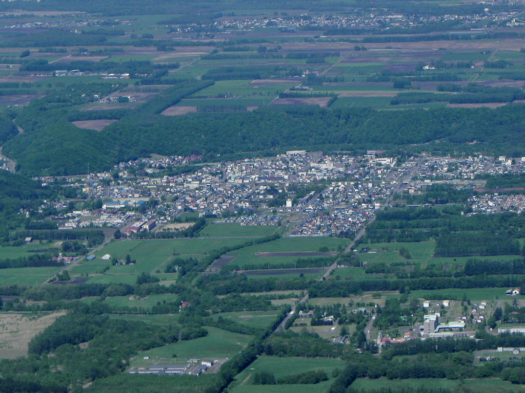 新得町（Shintoku town）